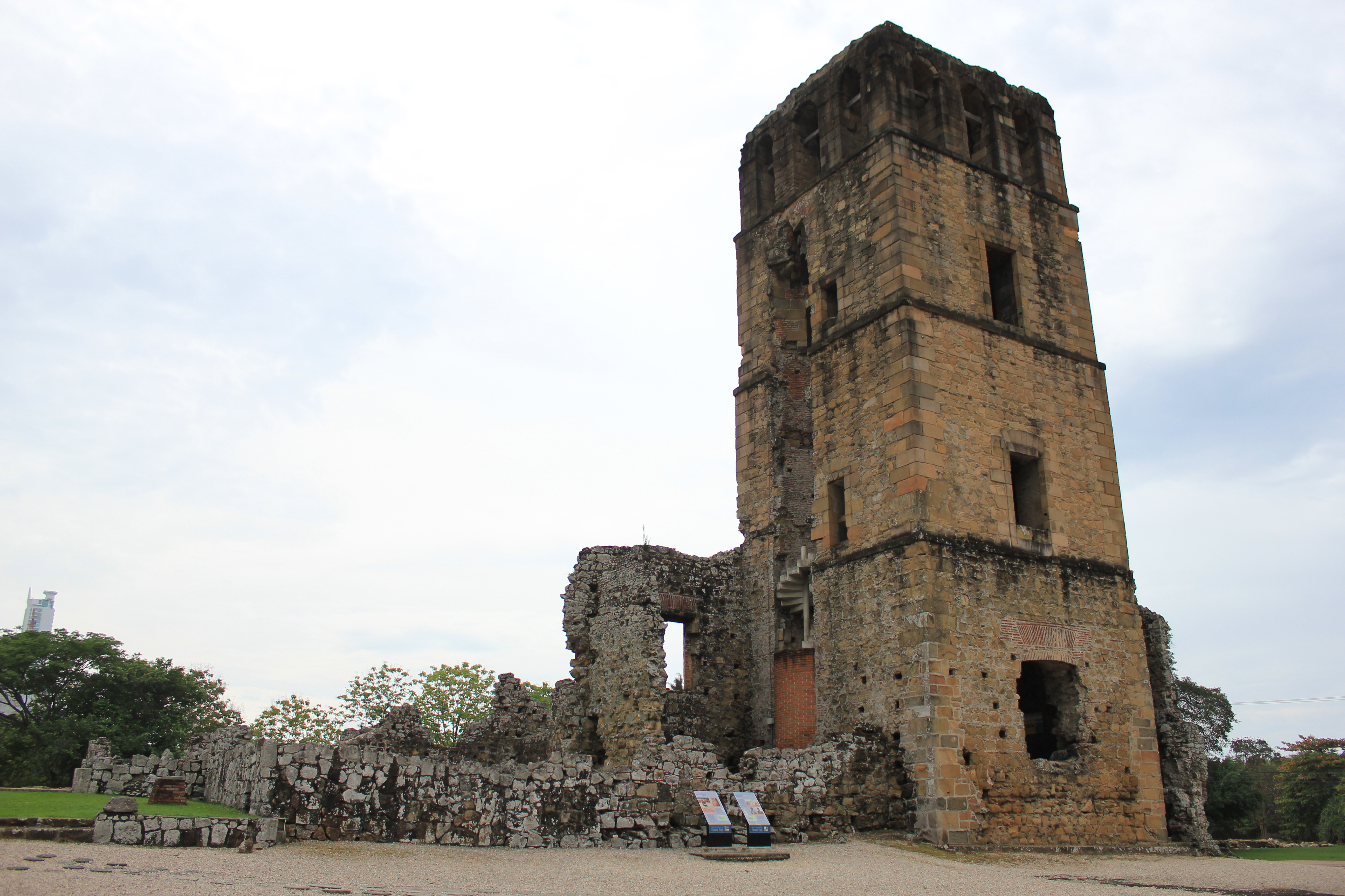 Catedral de Panamá Viejo. La Catedral es el monumento más importante del Conjunto Monumental Histórico de Panamá Viejo.